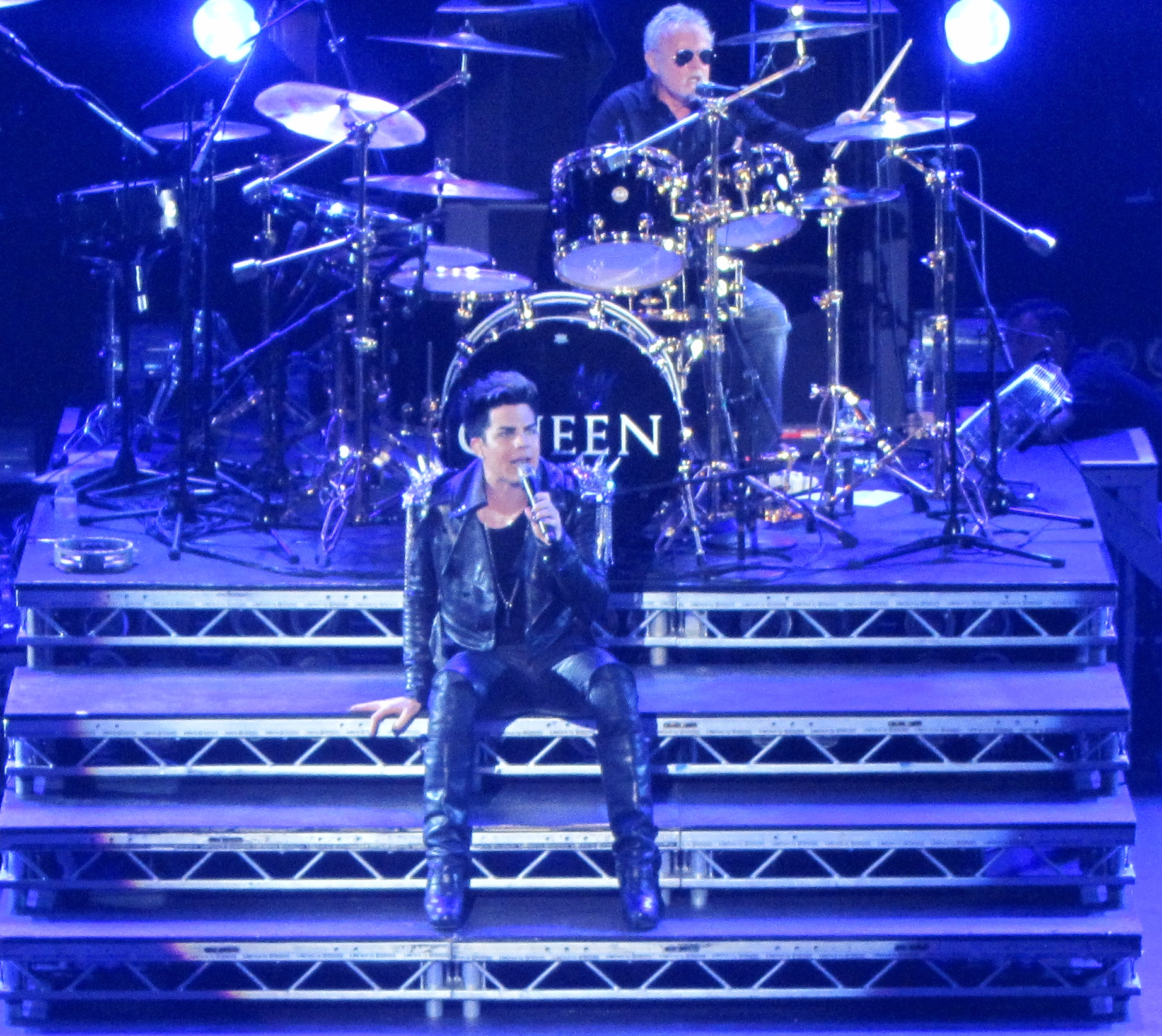 Roger Taylor von QUEEN und Adam Lambert in London am 14. Juli 2012